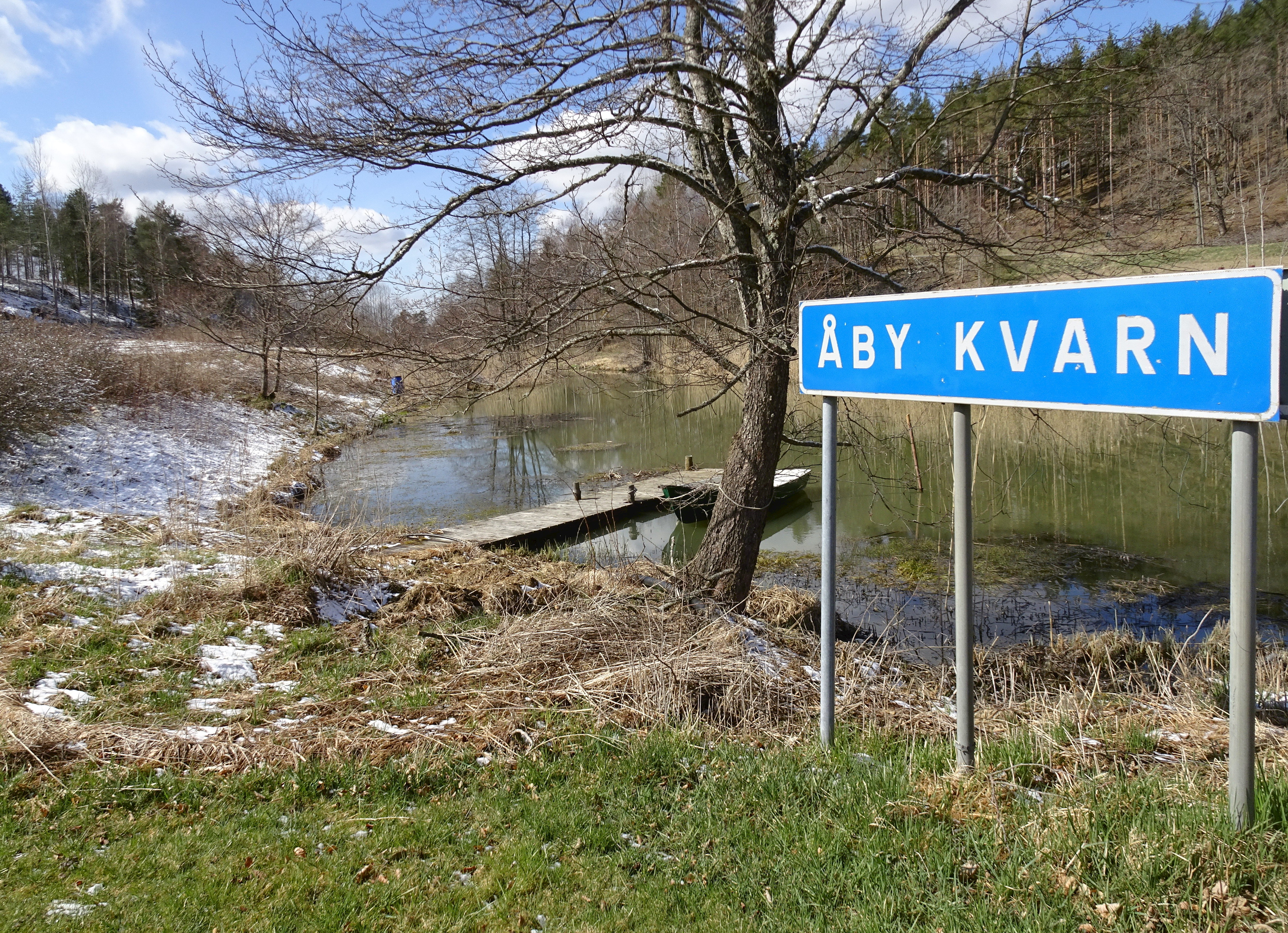 Åby kvarn, ortskylt